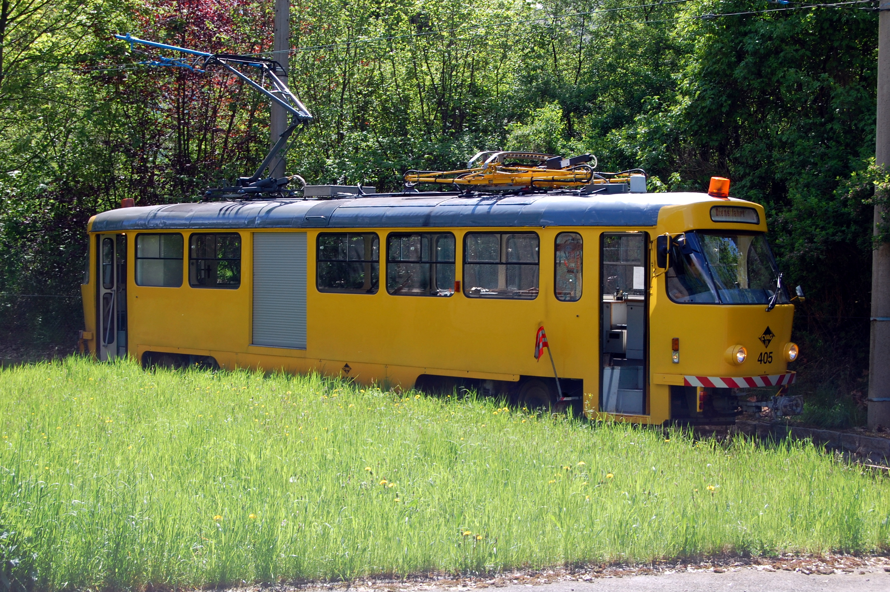 Straßenbahn-Arbeitswagen Tatra T3D der Chemnitzer Verkehrs-Aktiengesellschaft